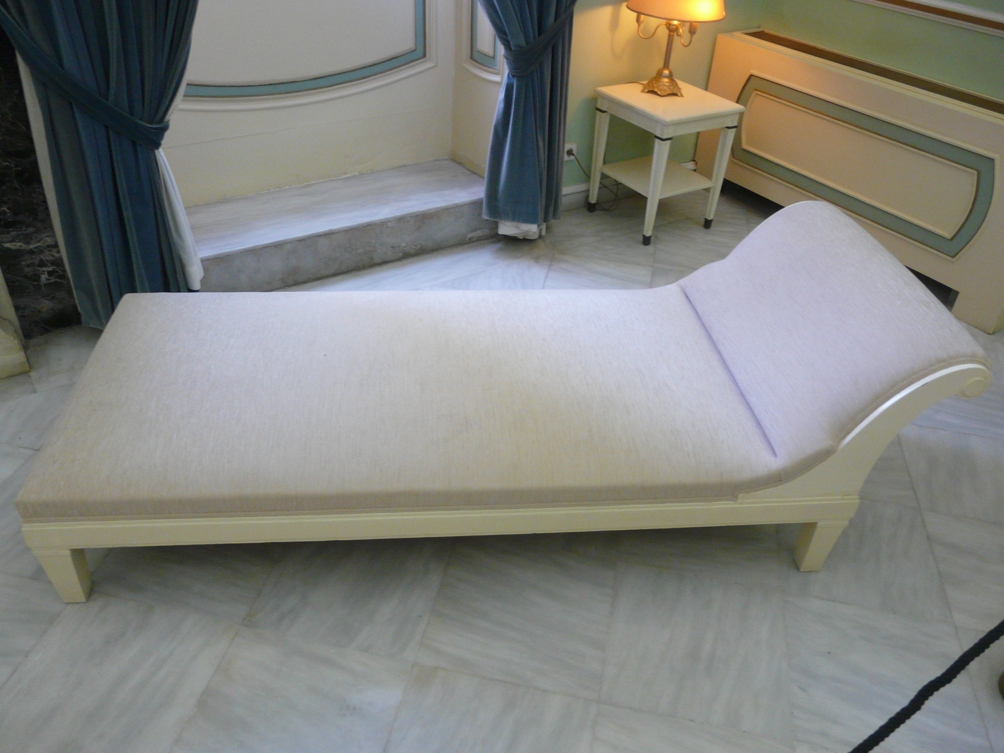 Achilleion